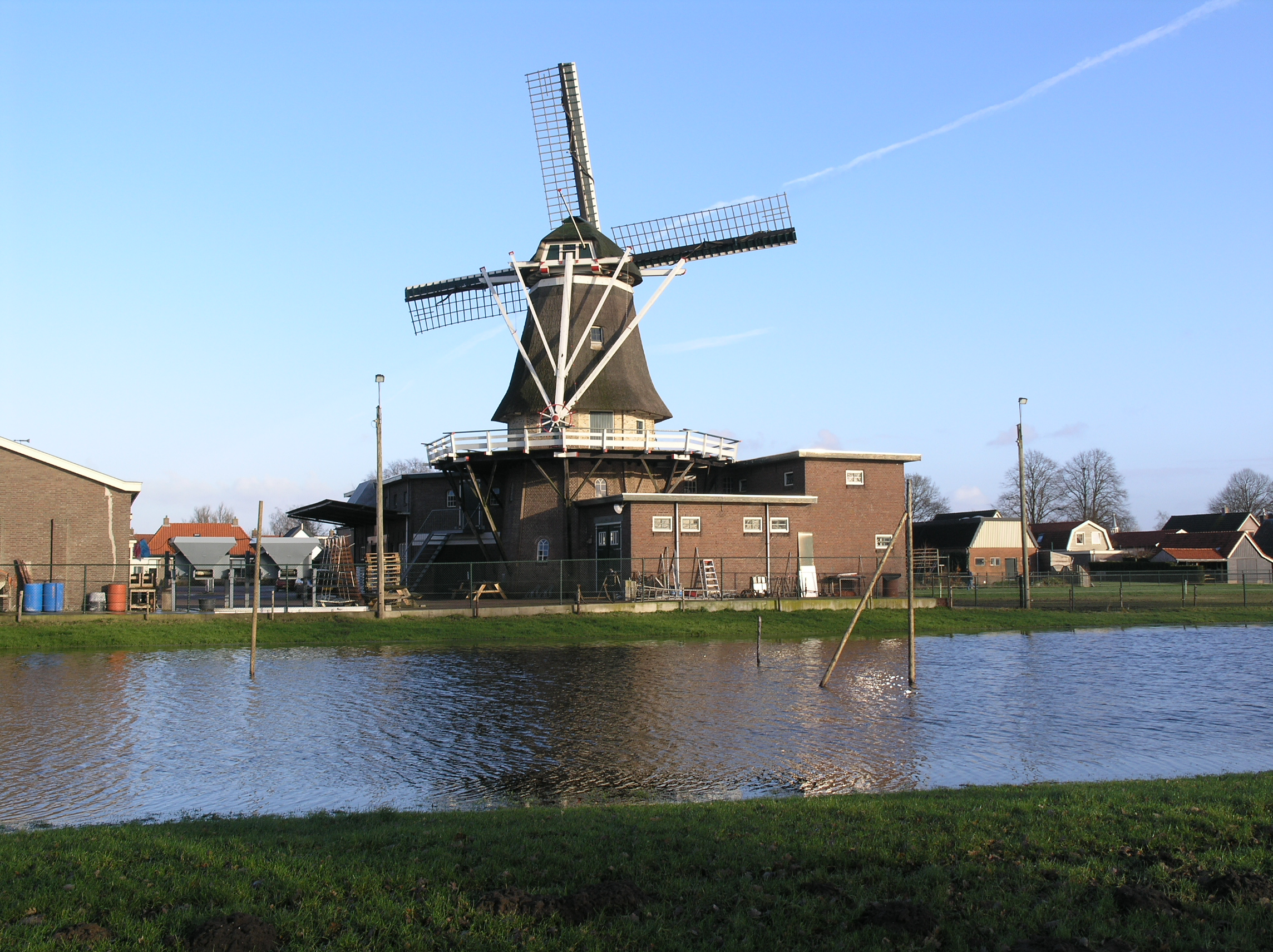 De Blesse Stellingmolen De Mars